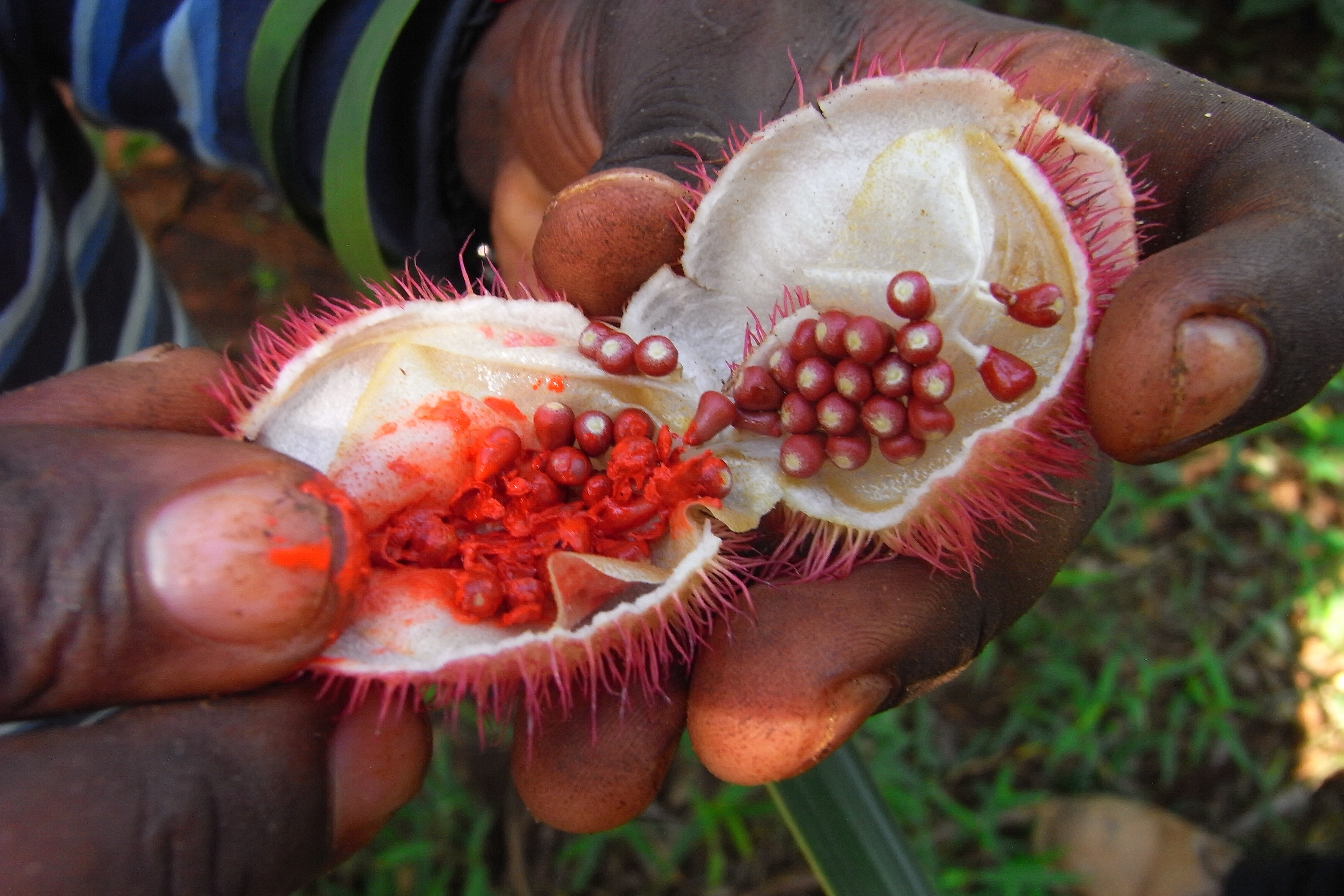 Lipstick